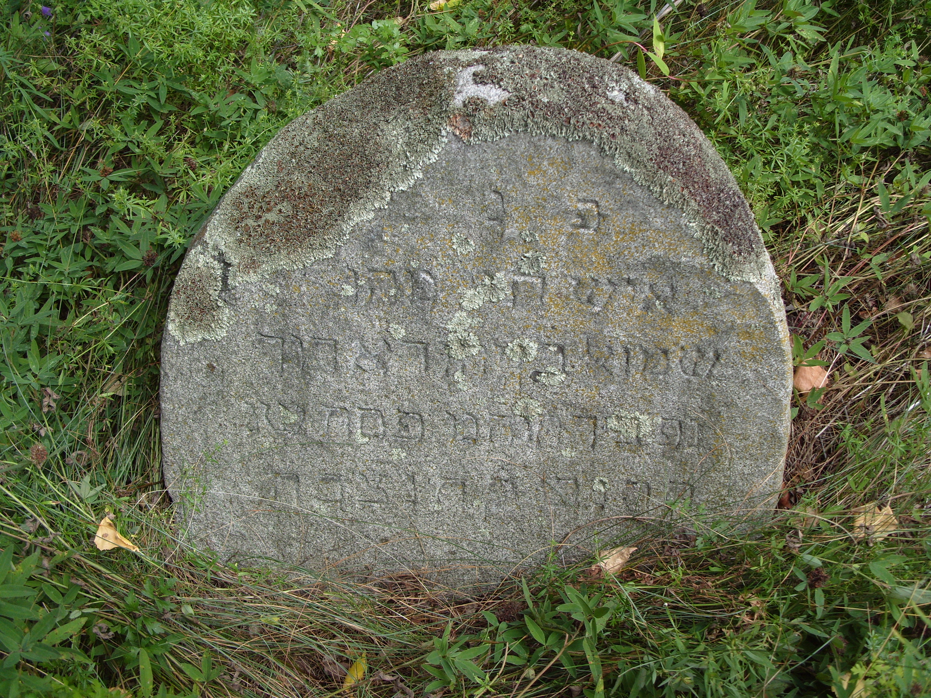 Беларуская (тарашкевіца): Сяліба, надмагільле на габрэйскіх могілках.